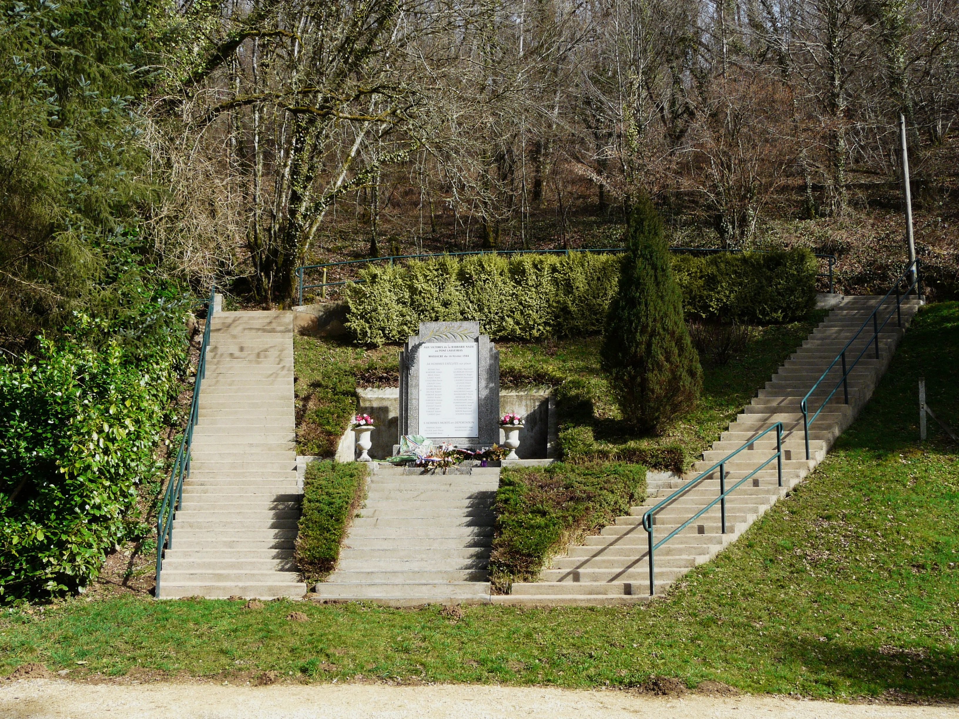 Mémorial dédié au massacre des résistants du Pont Lasveyras, moulin de la Papeterie, Beyssenac, Corrèze, France